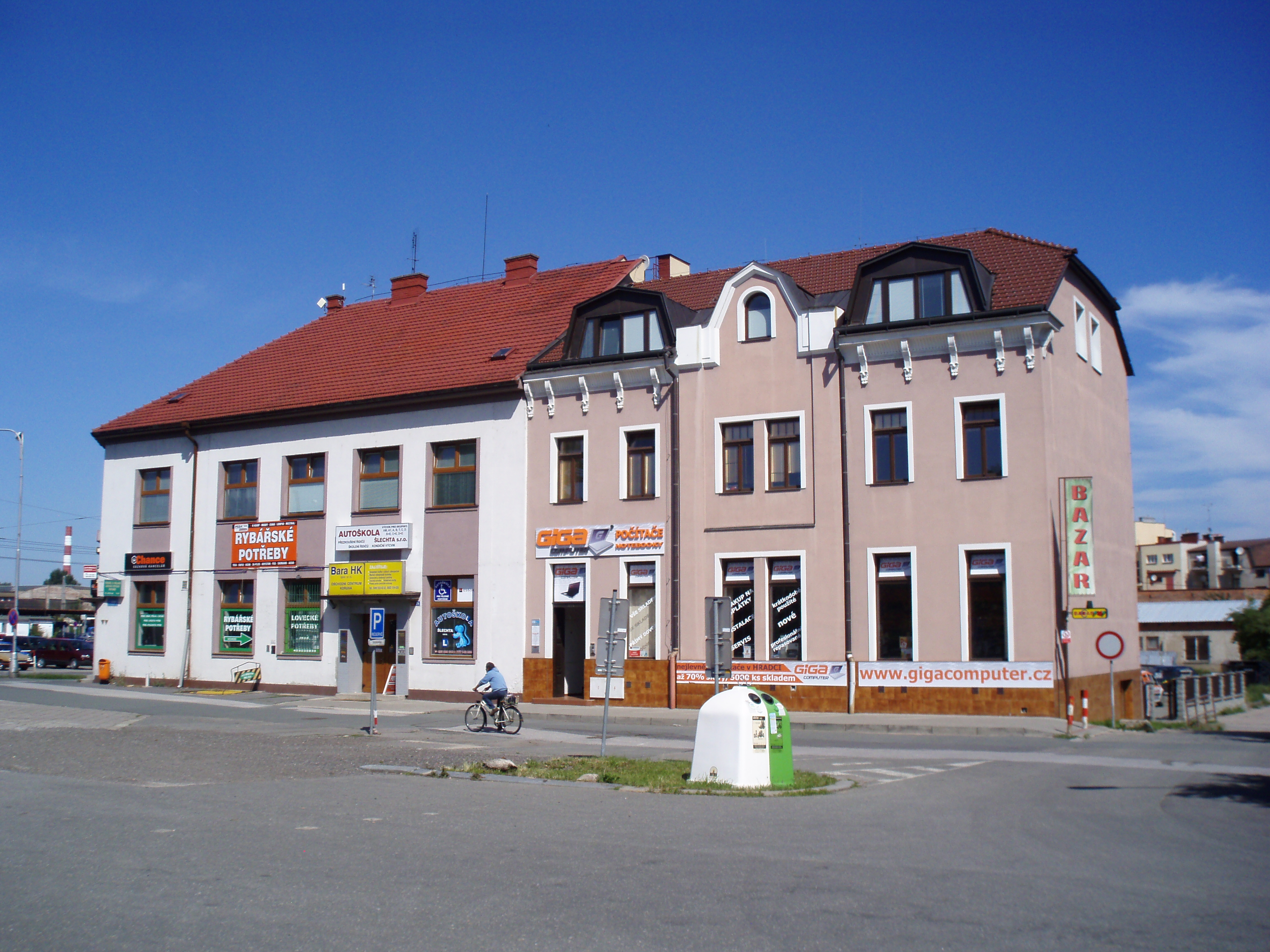 U Koruny čp. 292 a 414 (Hradec Králové)